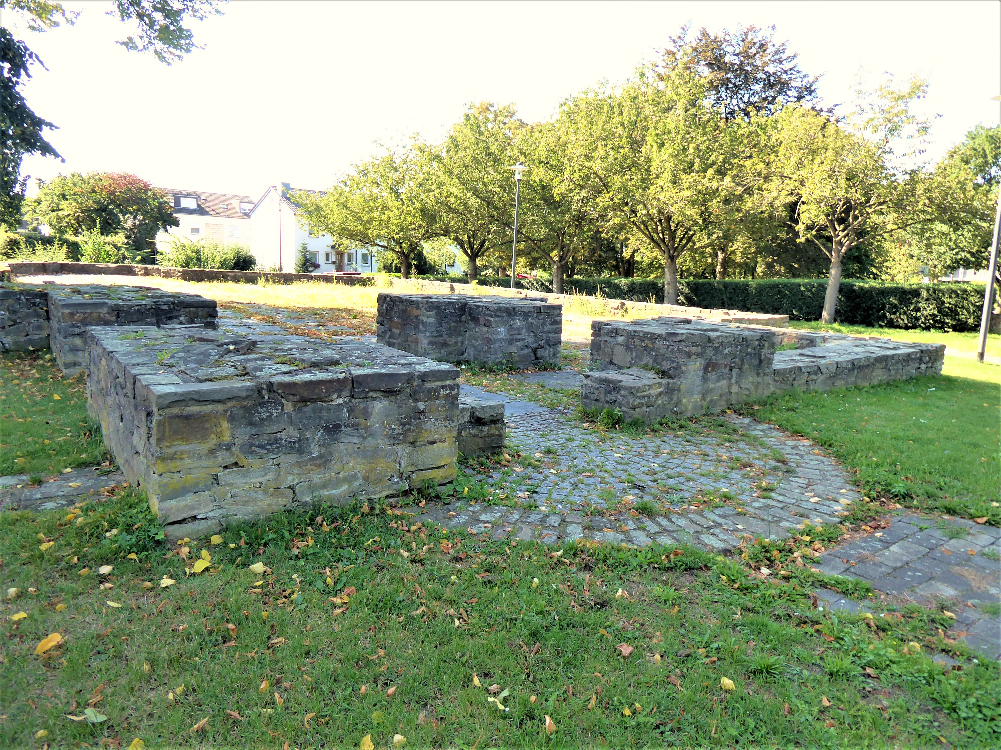 Alte Kirche St. Augustinus (Menden)